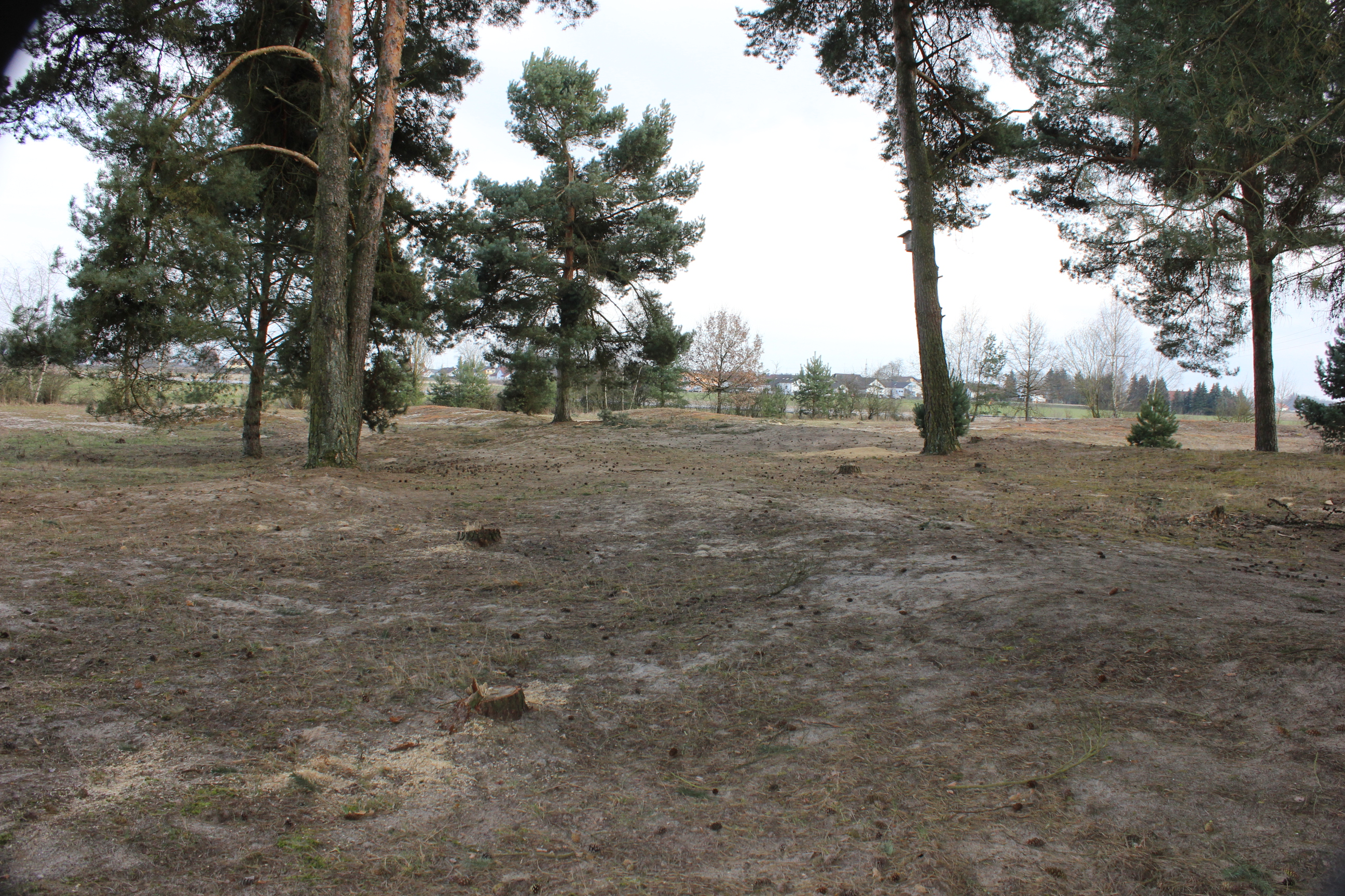 Düne südlich von Sand, Gemeinde Aiterhofen. Ein Teil der Düne ist eingezäunt und mit Kiefern bewaldet und zugleich Landschaftsschutzgebiet. Die Düne gehört zu den Geotopen im Landkreis Straubing-Bogen, 278R004.